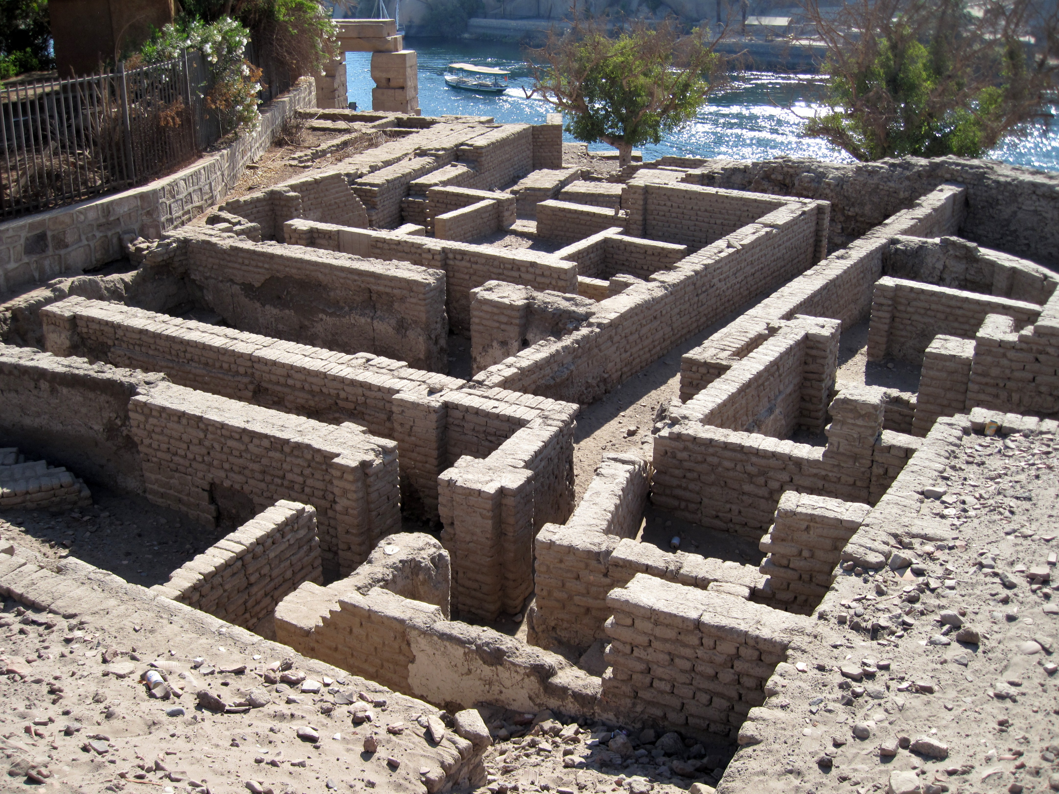 Überreste von Befestigungen und Häusern des Alten Reiches auf der Insel Elephantine in Assuan, Ägypten